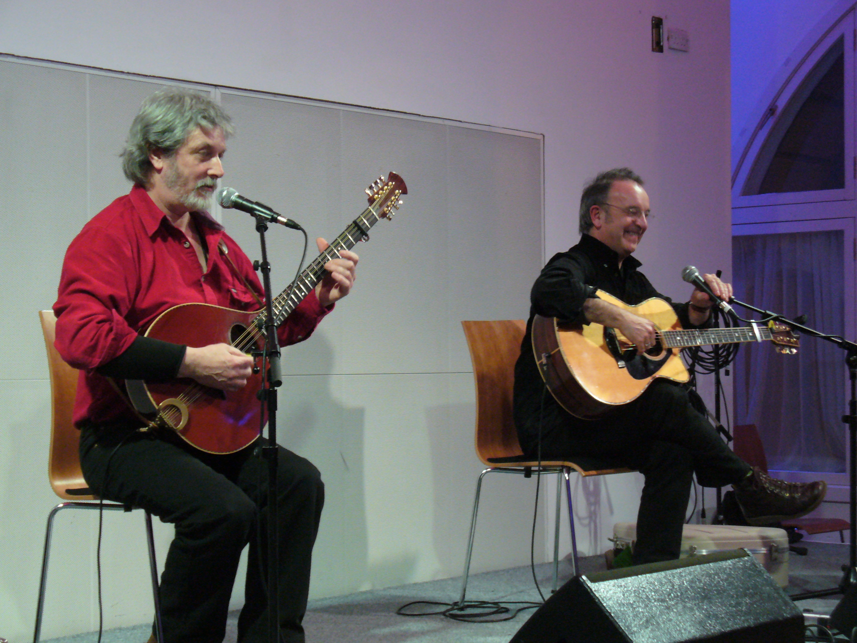 Soig Siberil & Jamie McMenemy